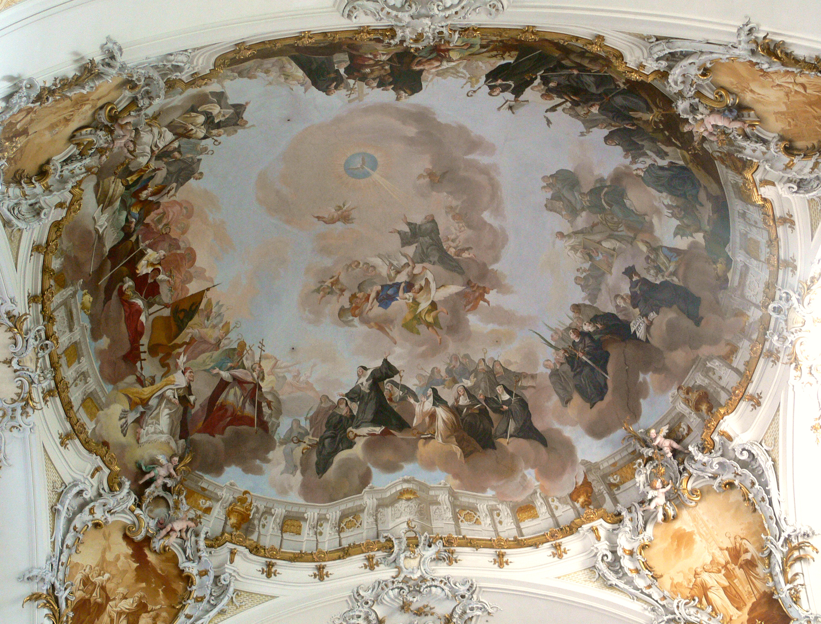 Glorie des Hl. Benedikt und seines Ordens - Fresko der Langhauskuppel (F38), Basilika Ottobeuren (Das Fresko von Johann Jakob Zeiller und Franz Anton Zeiller von 1759 zeigt den hl. Benedikt und die Heiligen des Benediktinerordens, von denen mindestens 25 durch ihre Attribute erkennbar sind, sowie drei heilige Päpste).